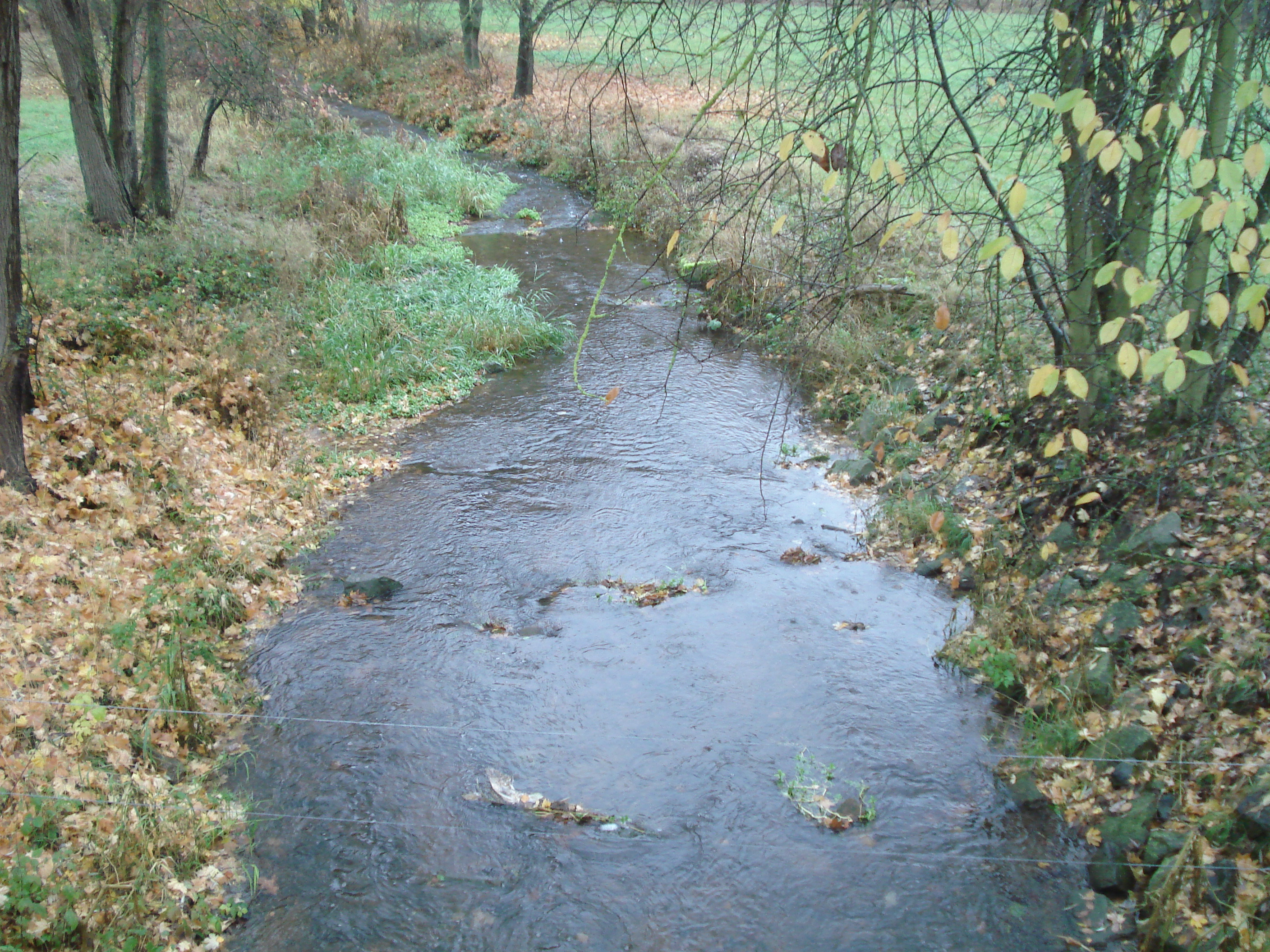 Der Kaltenbach in Pfohlbach